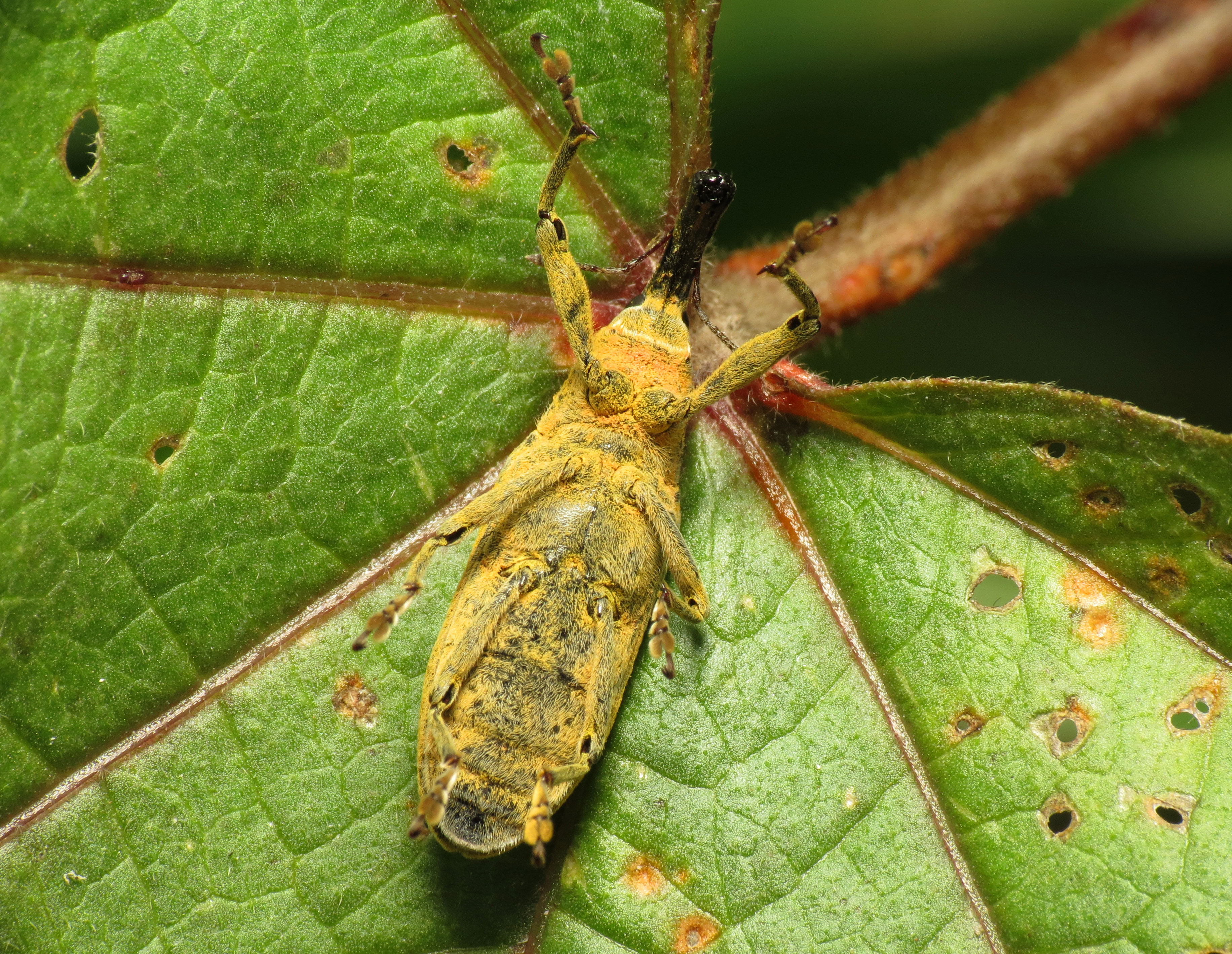 Lixus angustatus. Els Poblets, Comunidad Valenciana, Spain. 30 December 2012.